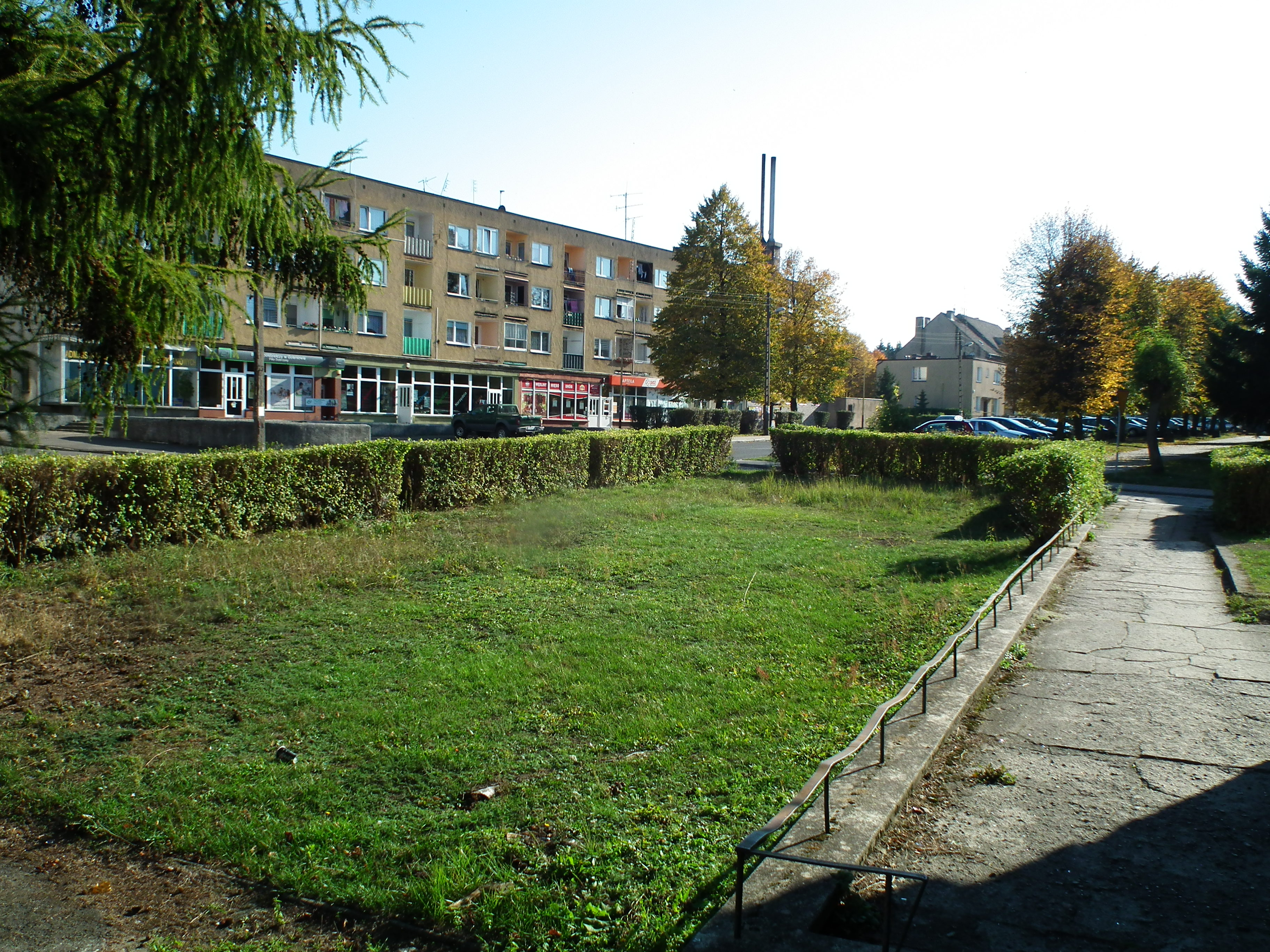 Widok miejski z Dobrzan.